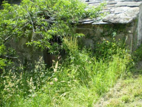 O Muíño de Meixide en Xove.